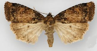 Bryolymnia ensina female